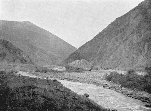 Darielpass 1906